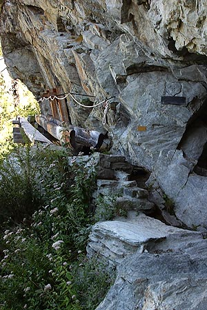 Baltschiedertal: Chänilzug Mehrheji (Historische Wasserleitung, hängend)